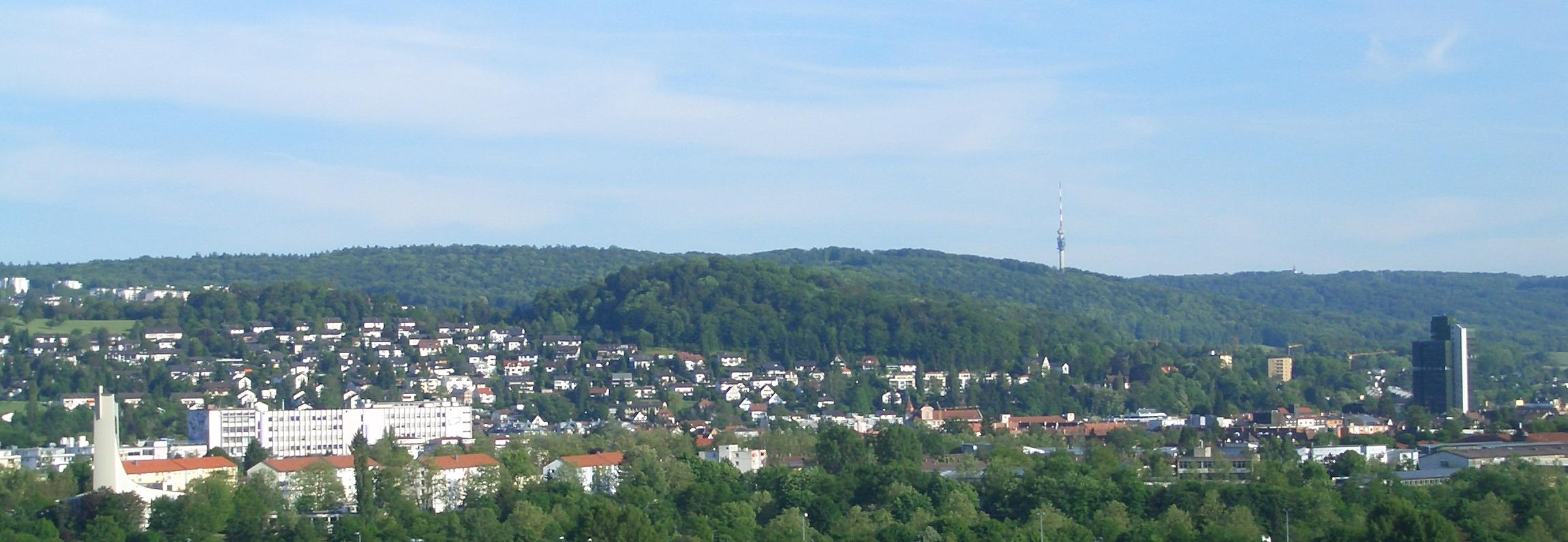 Panoramablick auf Lörrach: Auf dem Bild erkennt man neben dem Fernsehturm St. Chrischona die Milkafabrik, die Kirche St. Peter am Grüttpark und das Lörracher Rathaus (von links nach rechts).